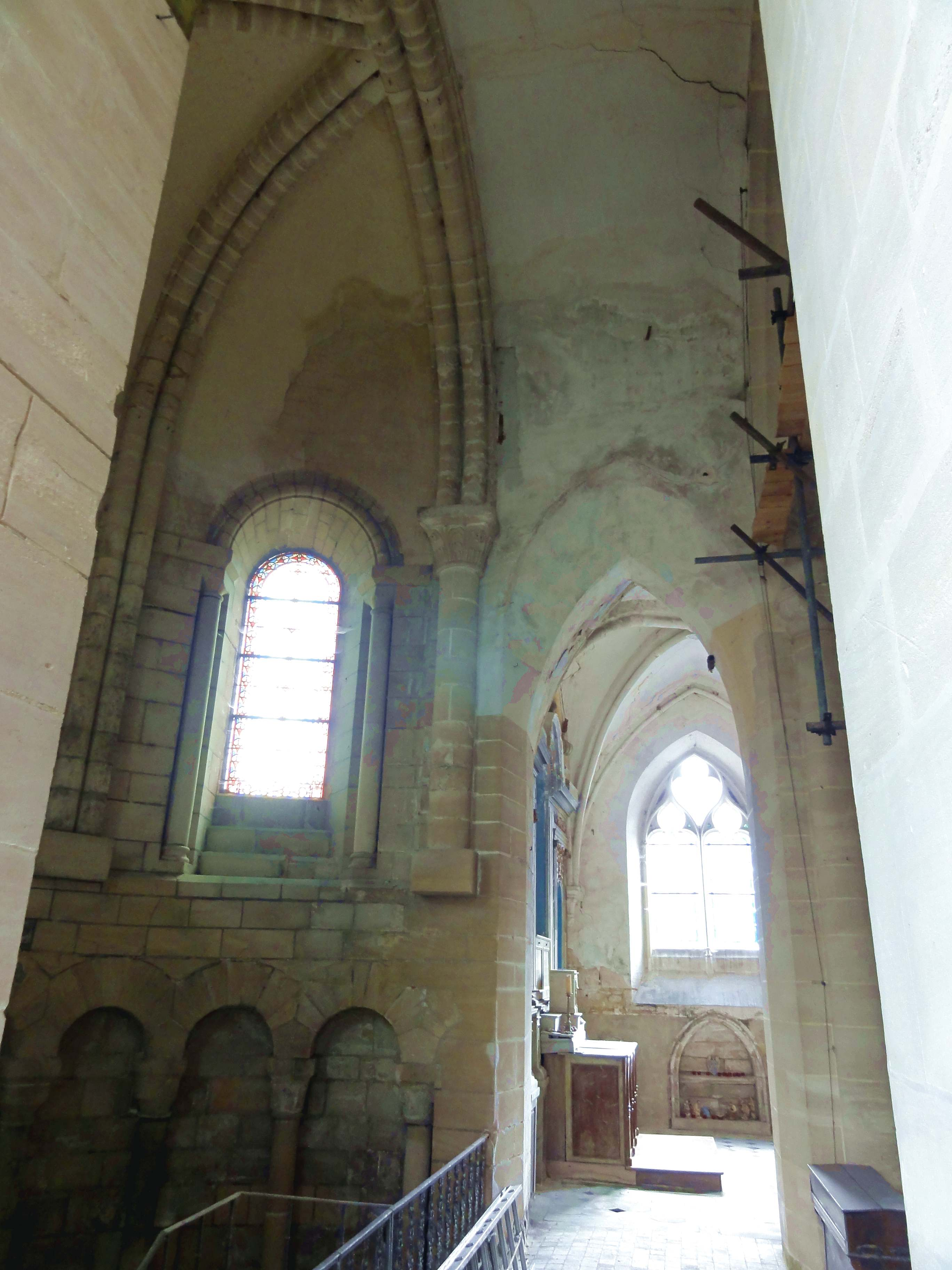 Intérieur de l'église - voir le titre du fichier.